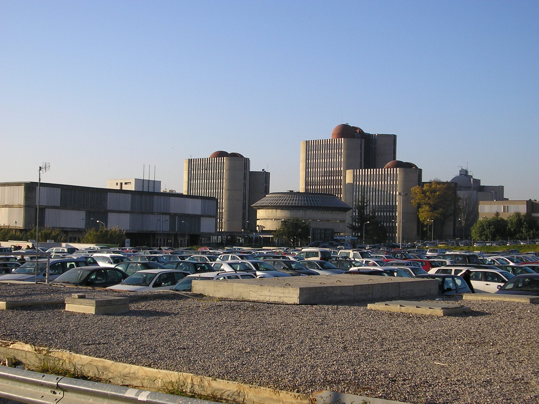 Antic edifici de la facultat d'història i geografia de la Universitat de Barcelona. Source: Makinal